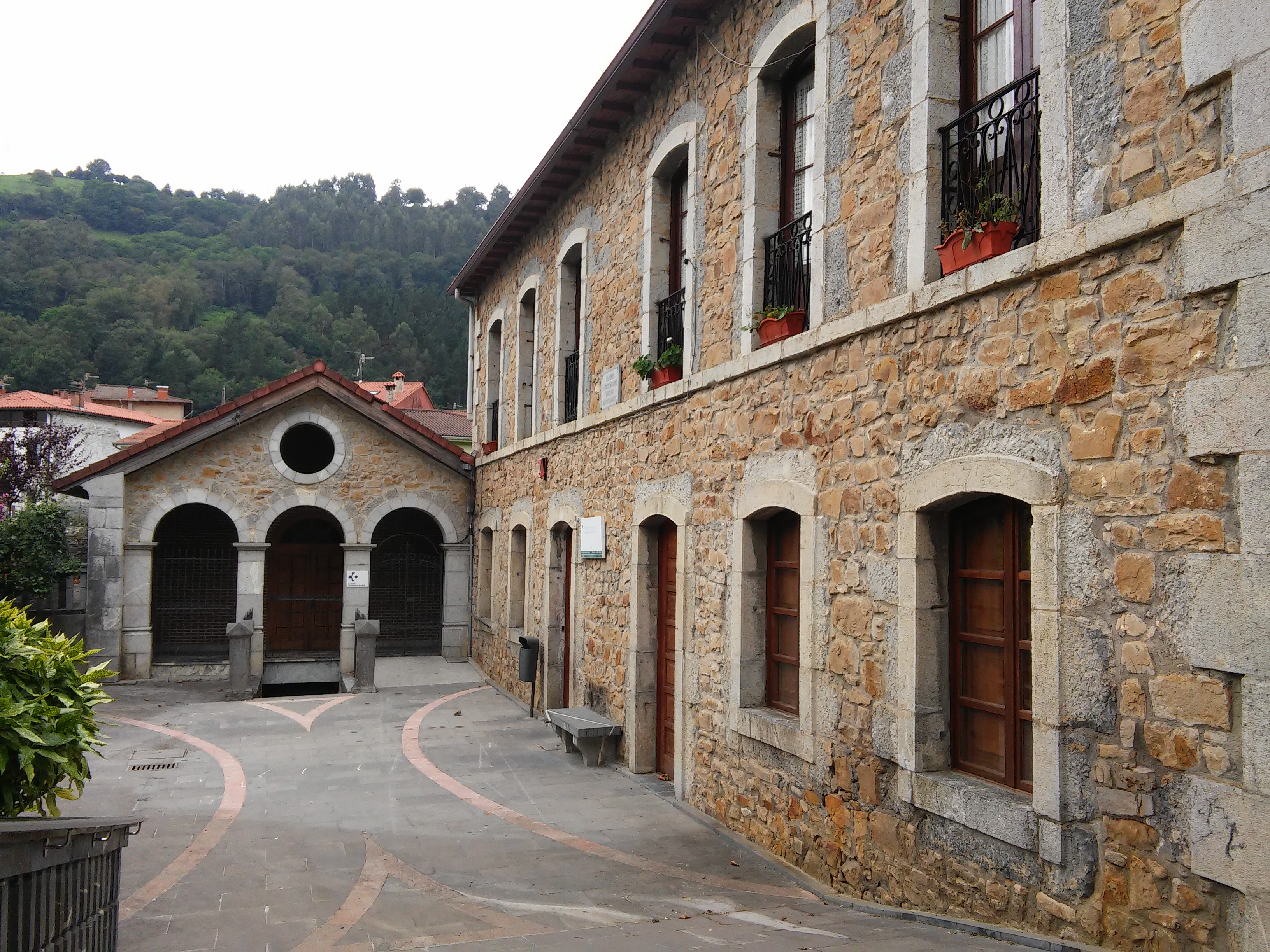 Lanestosako eskola